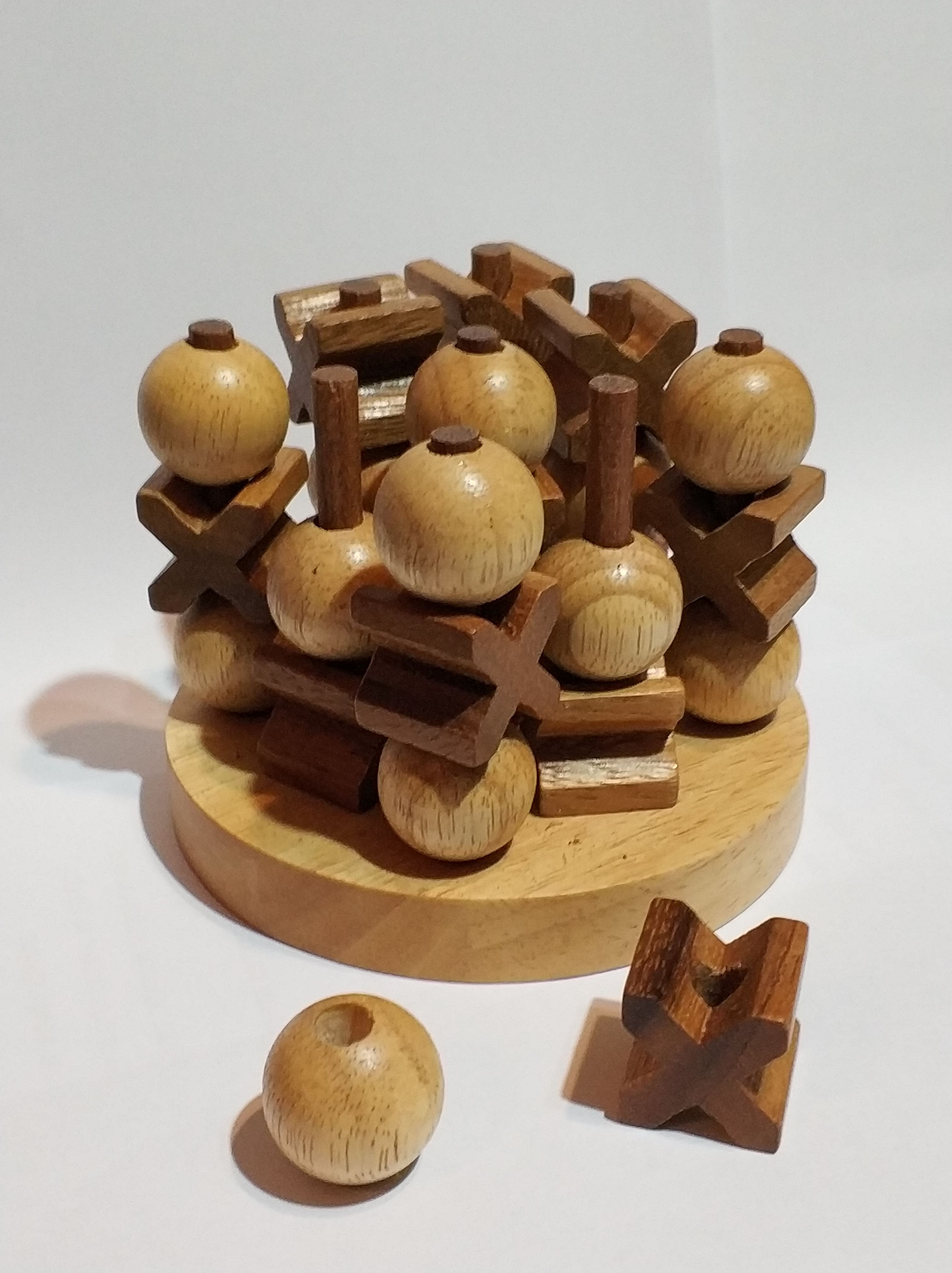 איקס עיגול תלת מימד 3D